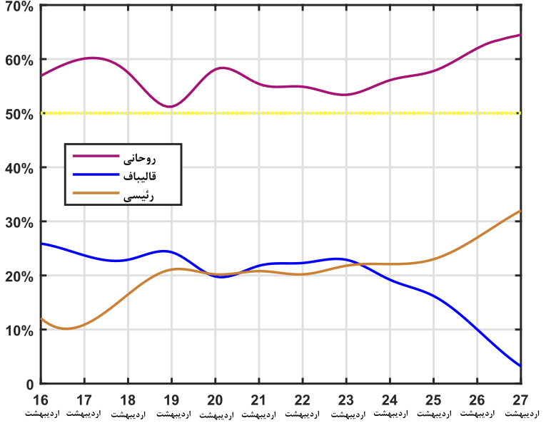 نتایج روزانه‌ی نظرسنجی iPPO با در نظرگرفتن تنها کسانی که کاندیدای مورد نظر خود را اعلام کرده‌اند.